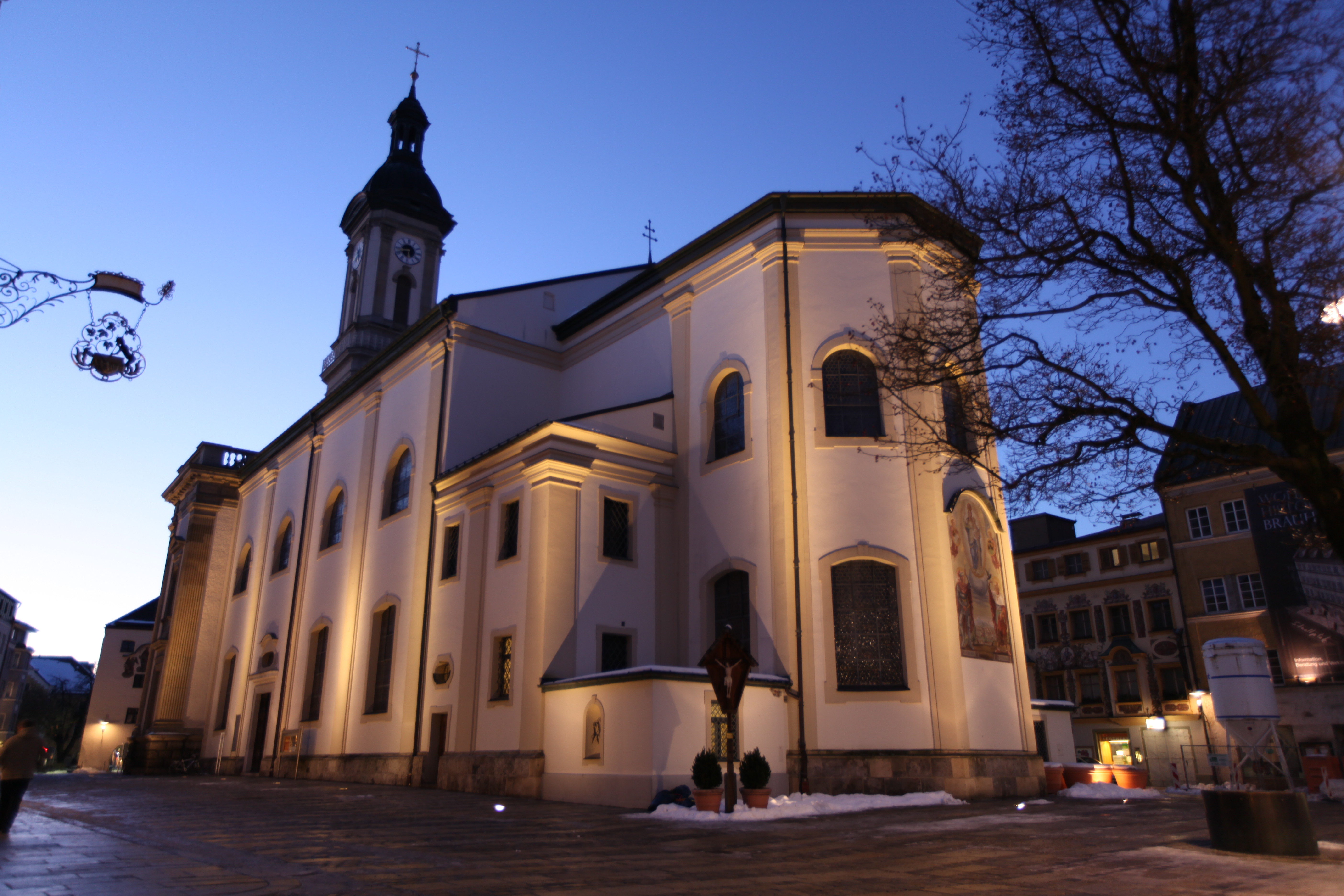 St. Oswald Kirche Traunstein